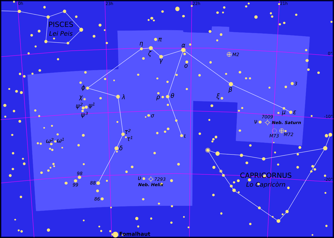 Constellacion d'Aqüari.